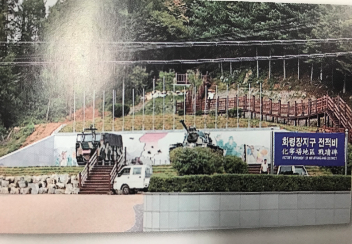 화령지구 전적비(대전-상주 간 고속도로 화서나들목 부근 위치)